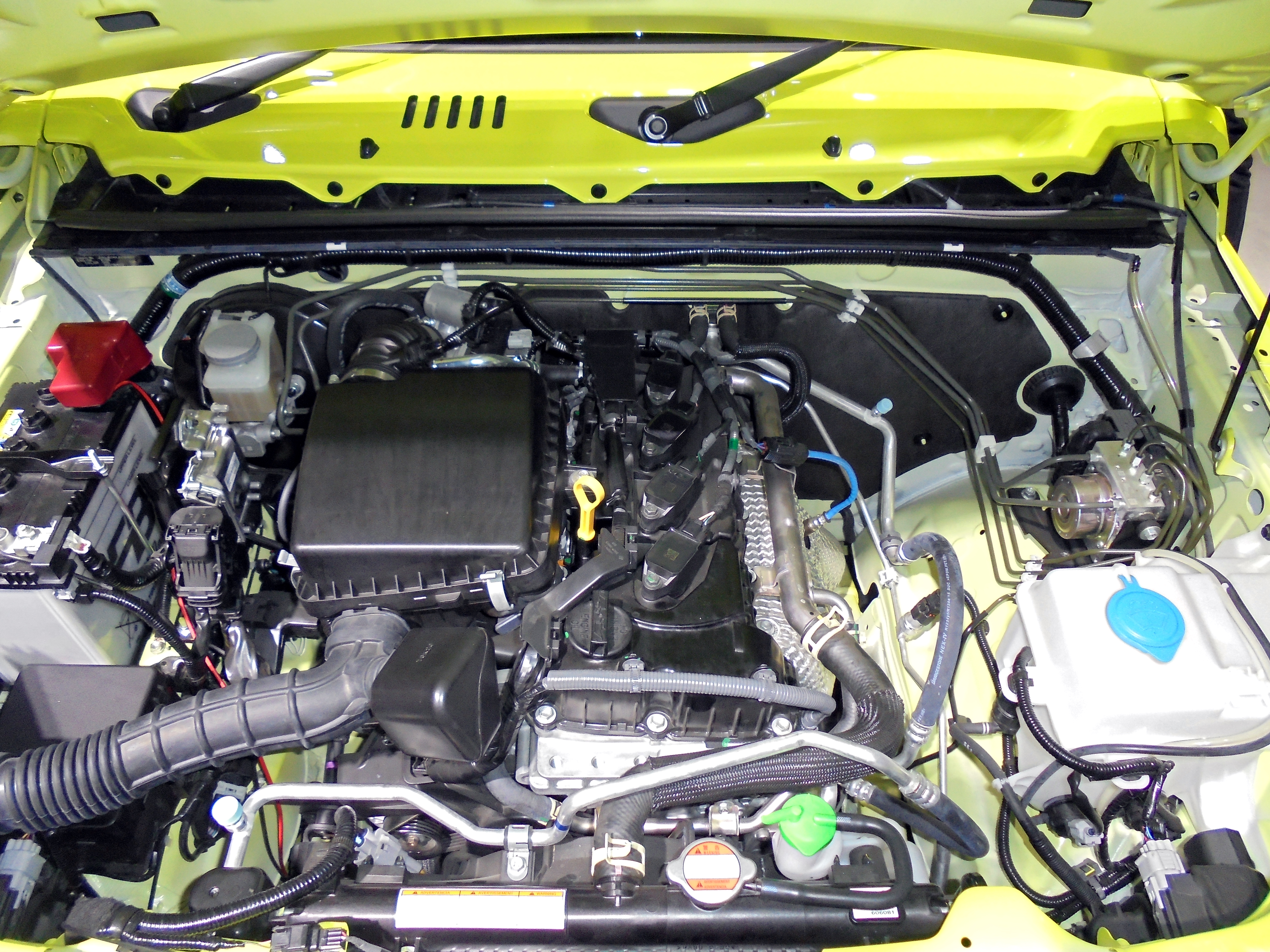 スズキ・ジムニー (シエラ) K15B エンジン